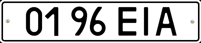 Передний номерной знак автомобилей юридических лиц Украины, стандарт 1992 года